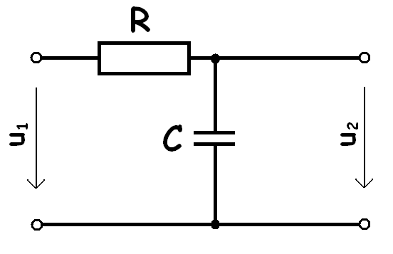 Schéma zapojení dolnopropustního filtru